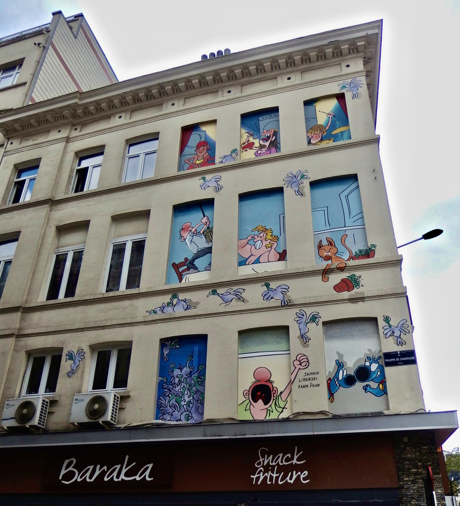 Stripmuur Froud en Stouf te Brussel